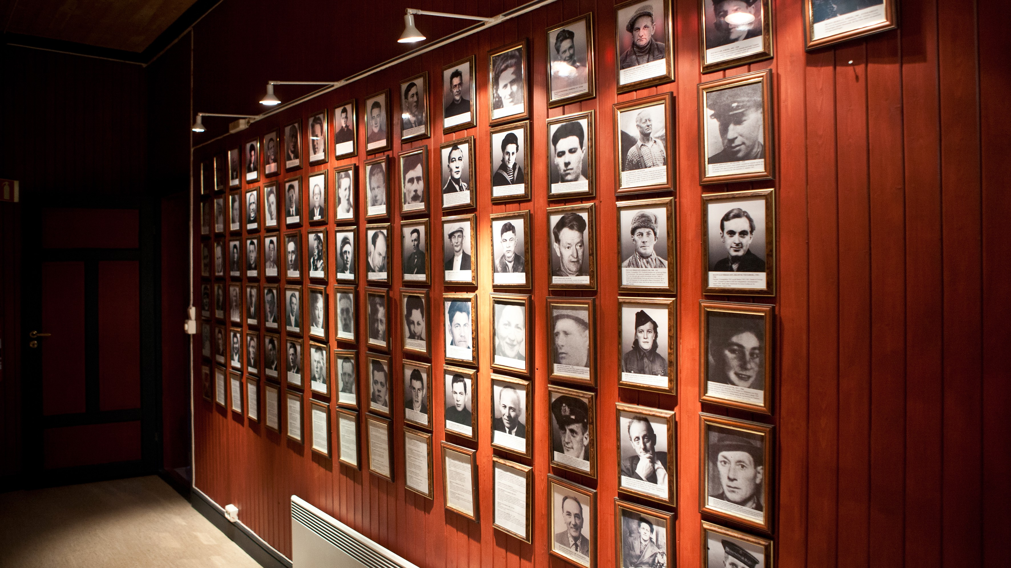 The Partisan Museum in Kiberg